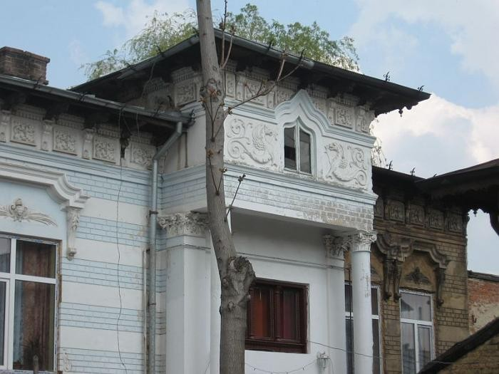 Casă de pe strada Afluentului